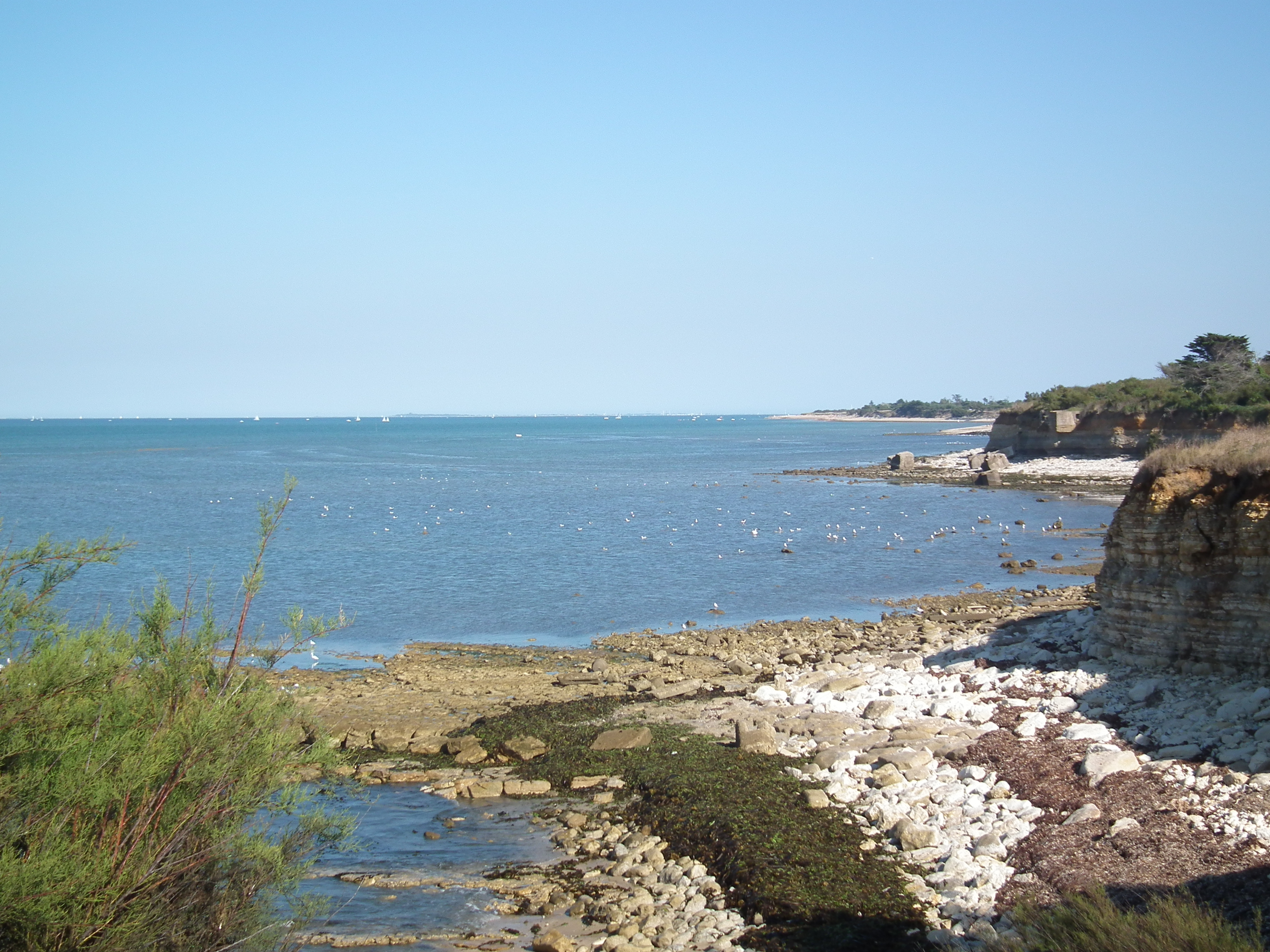 La côte à Saint-Denis-d'Oléron